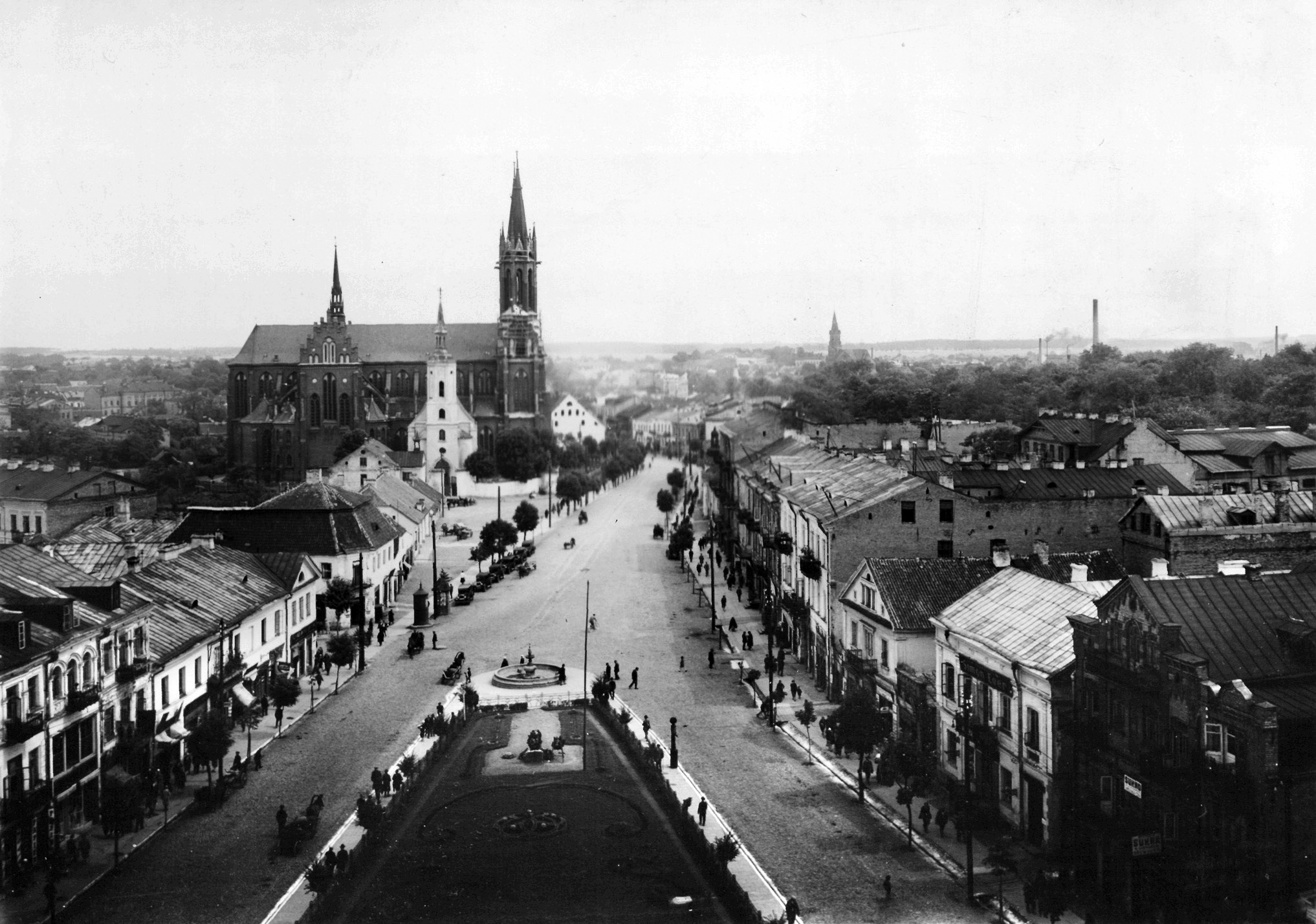 Katedra Wniebowzięcia Najświętszej Panny Marii w Białymstoku w perspektywie ulicy Lipowej